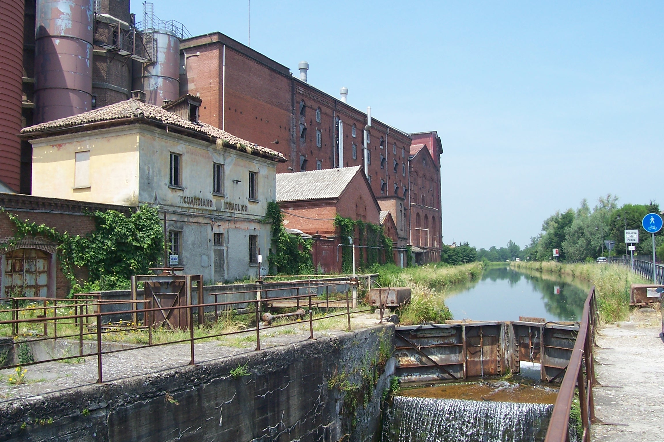 Pavia, La Casa del custode idraulico Alla Conca di Torre del Mangano, Oggi Certosa di Pavia